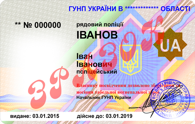 Зразок службового посвідчення працівника Національної поліції України